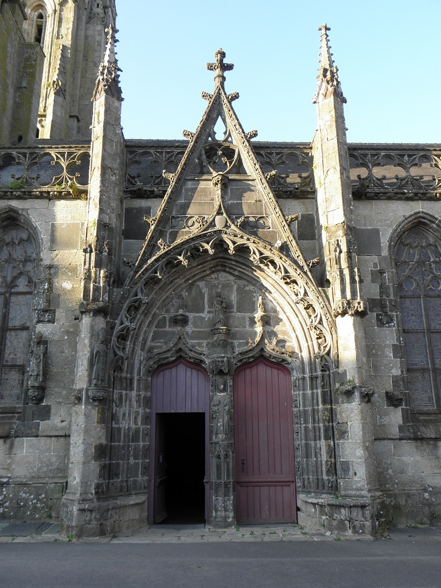 Portail méridional de la basilique notre-Dame du Folgoët (29).